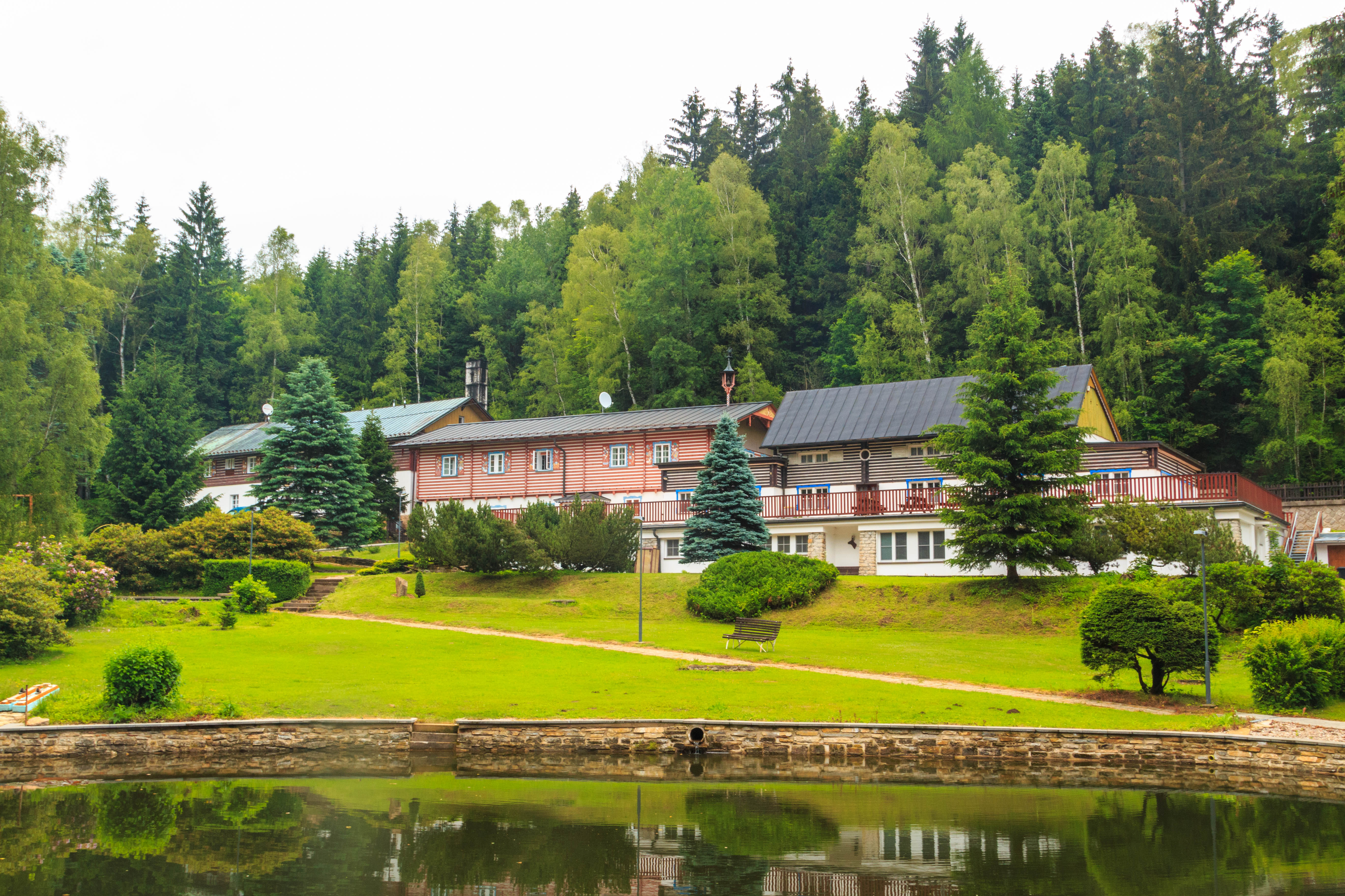 Zelinkův mlýn - rekreační středisko